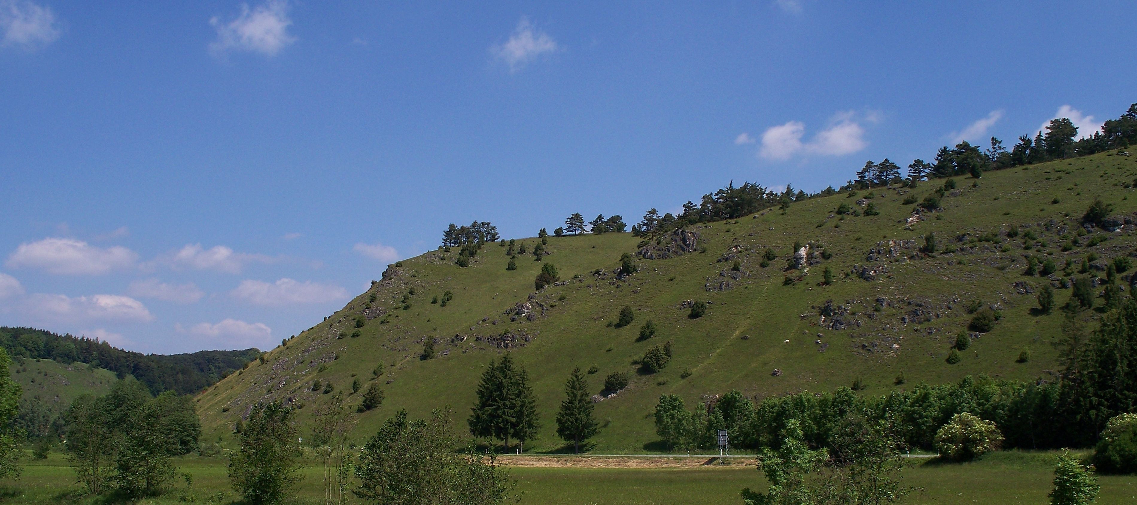 Karstlandschaft im Landkreis Eichstätt.